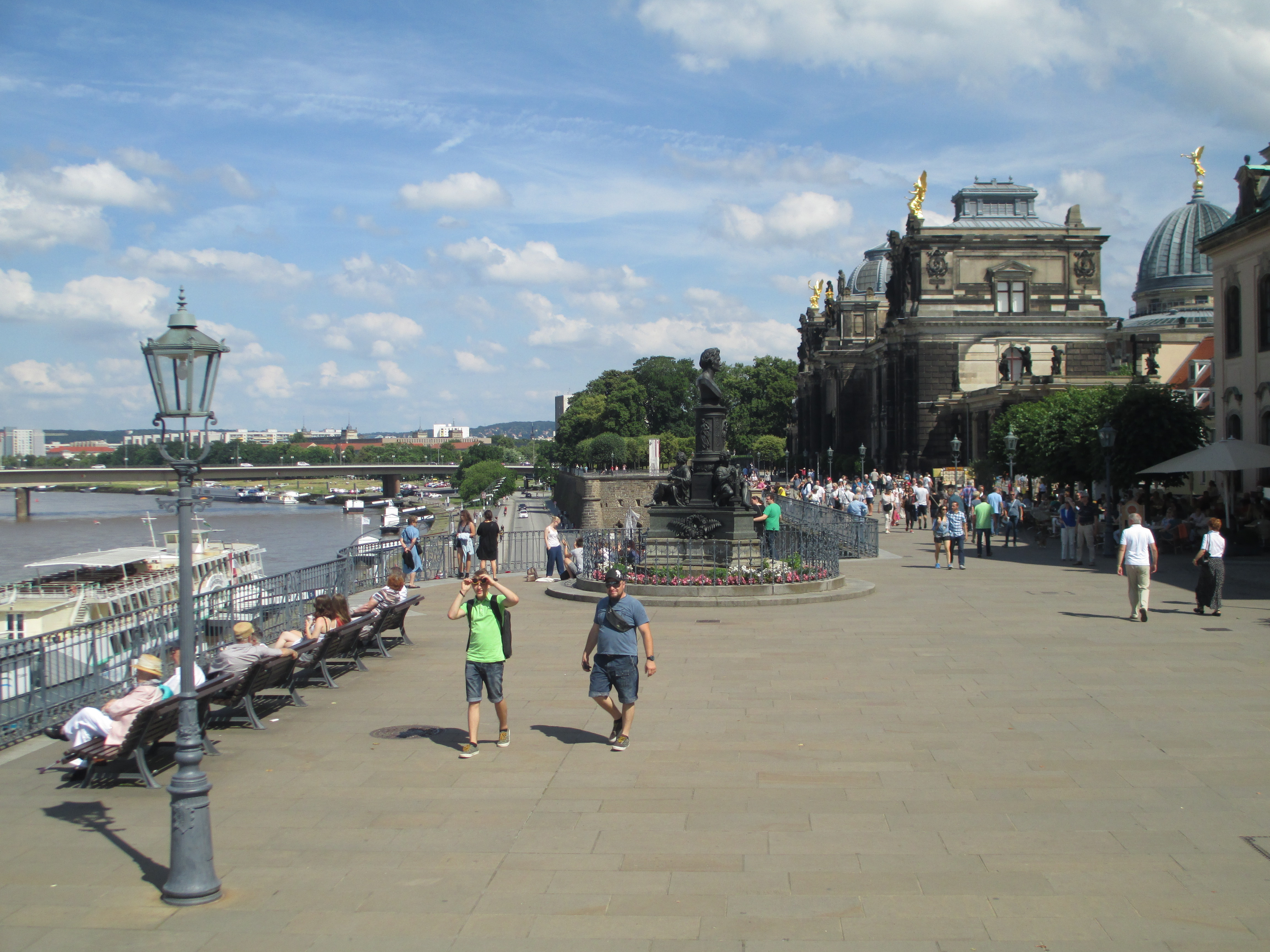 מרפסת ברוהל בדרזדן